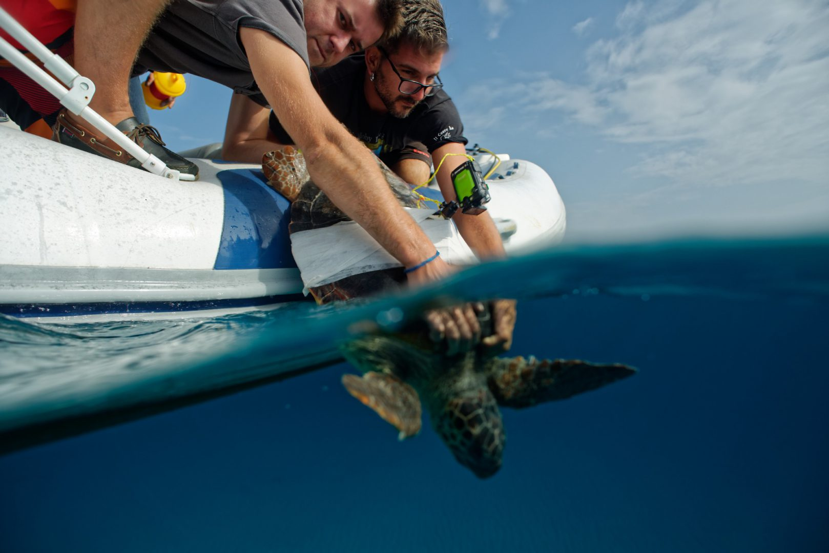 Une tortue marine est libérée au large de Lampedusa, avec une petite caméra étanche fixée sur sa carapace.